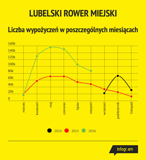 Statystyki z funkcjonowania Lubelskiego Roweru Miejskiego